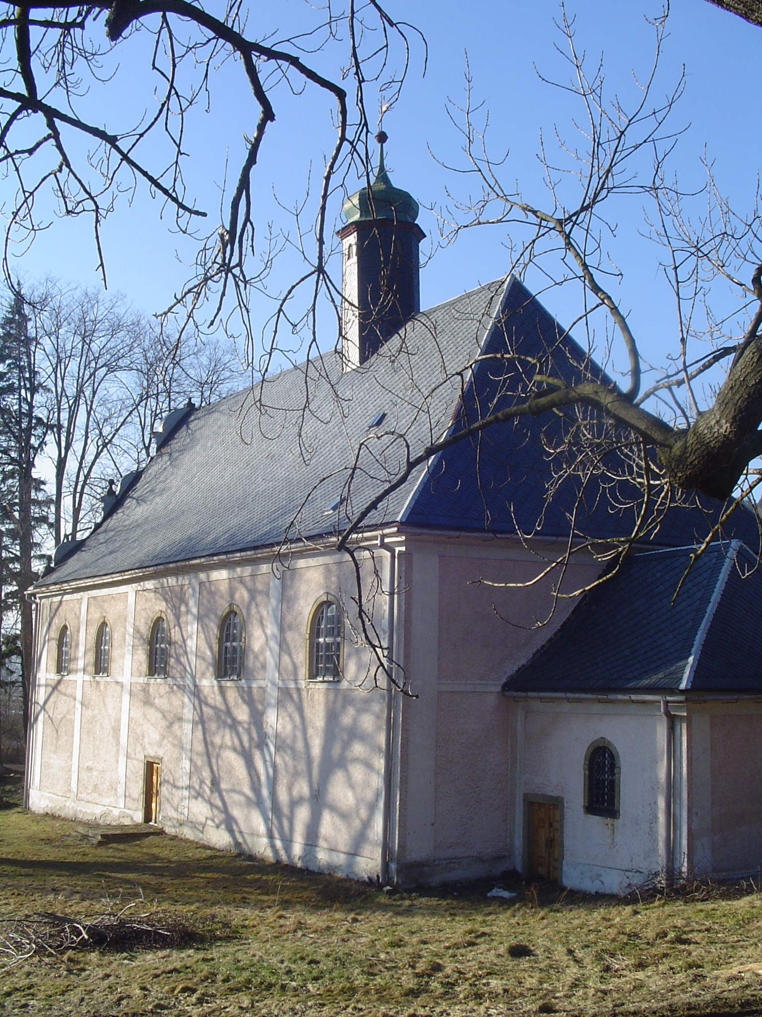 Lubawka Ulanowice (Podlesie) - kościół p.w. Świętych Wspomożycieli, obecnie p.w. św. Krzysztofa 1685, 1723